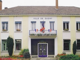 La mairie de Dugny (Seine-Saint-Denis)